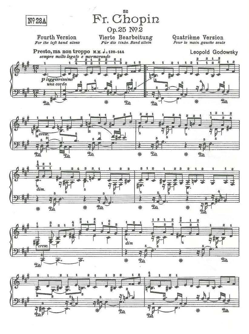 1. Seite von Leopold Godwoskys Studie 28A zu Chopins Etüde op. 25.2